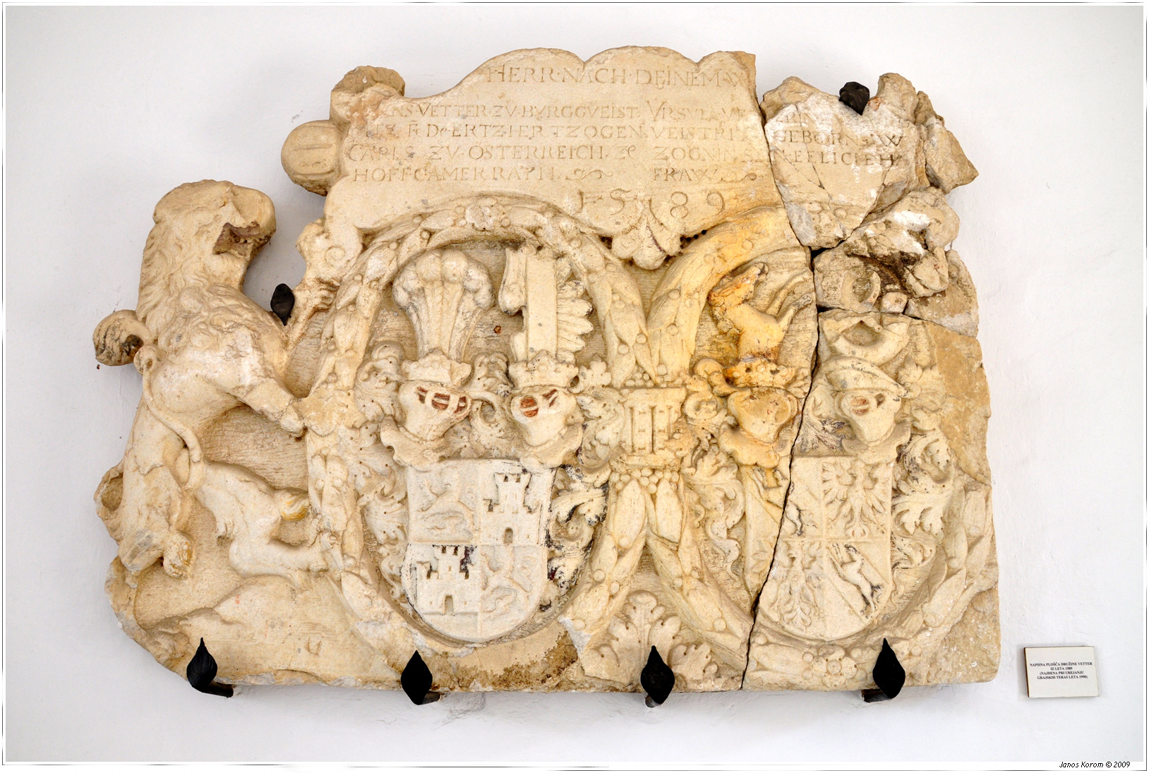 Schloss Windischfeistritz